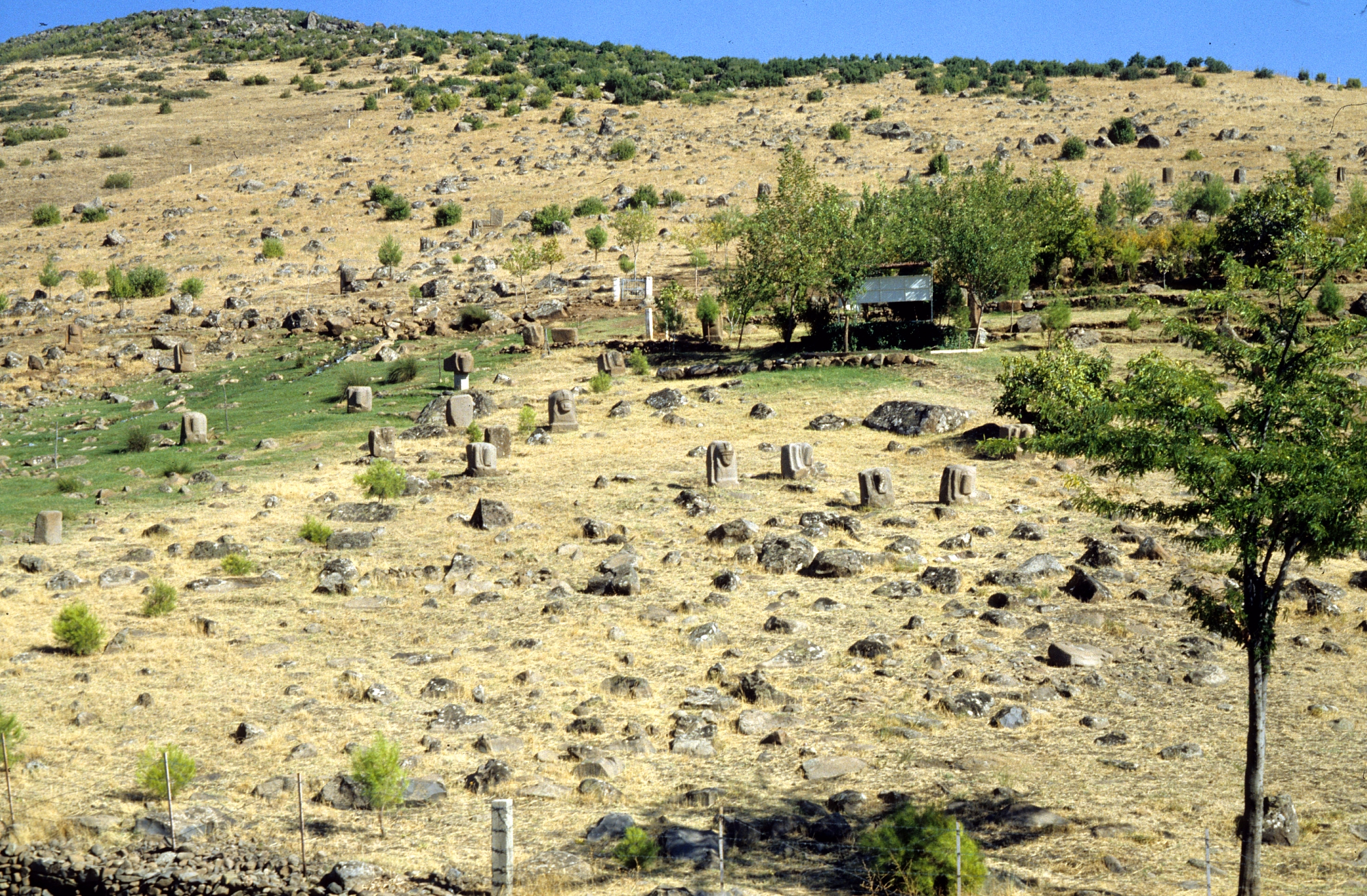 Yesemek, Hethitische Bildhauerwerkstatt, Südosttürkei, Gesamtansicht